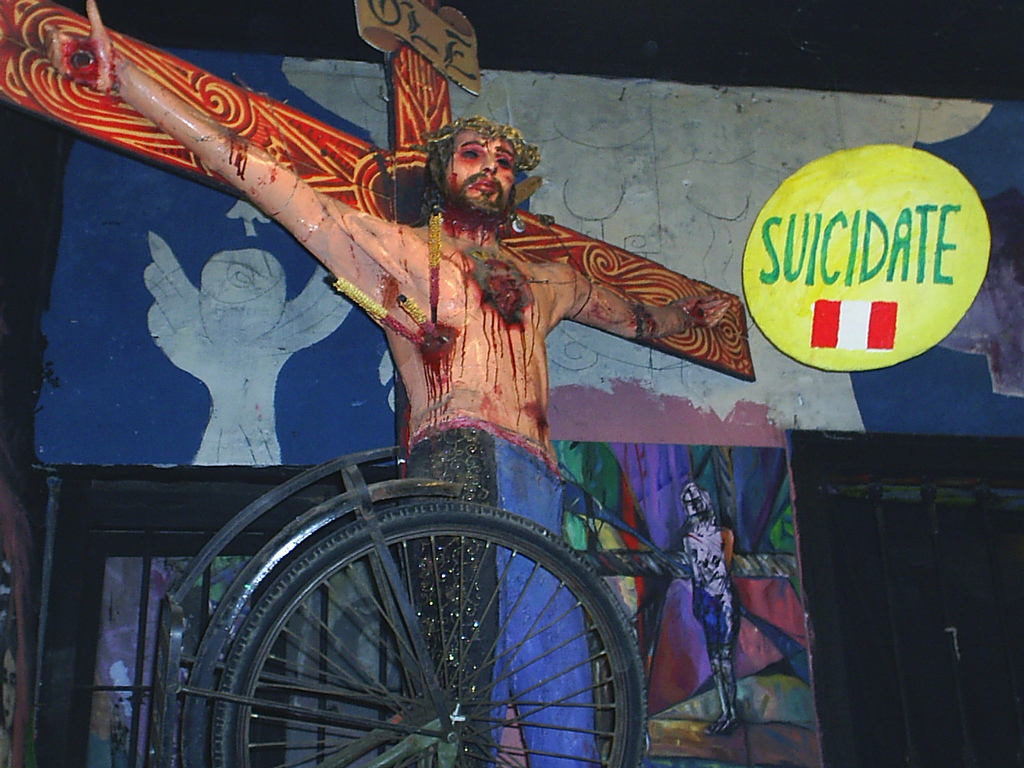 Cristo antitaurino, Perú.